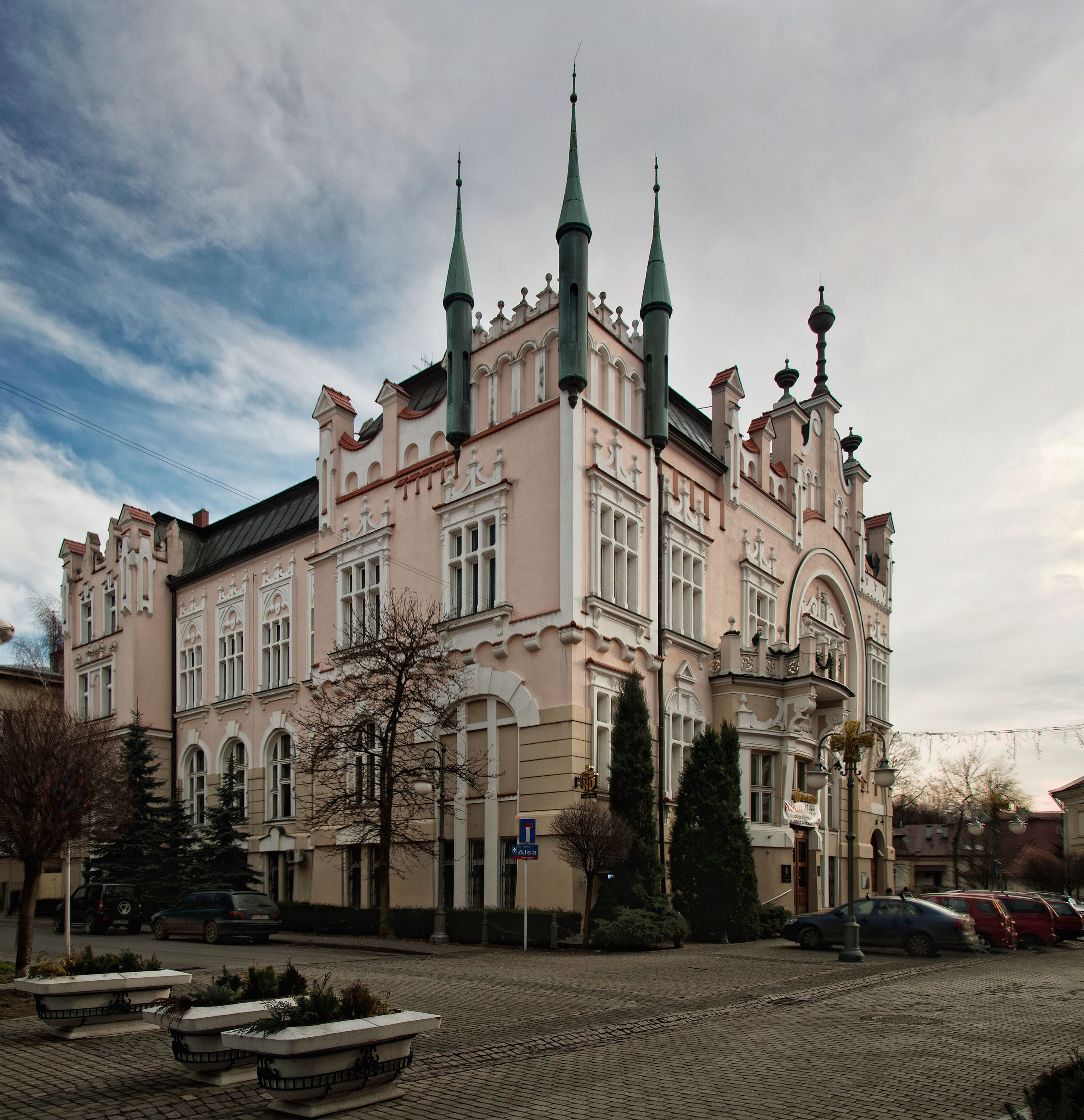 Rzeszów, gmach PKO, 1906